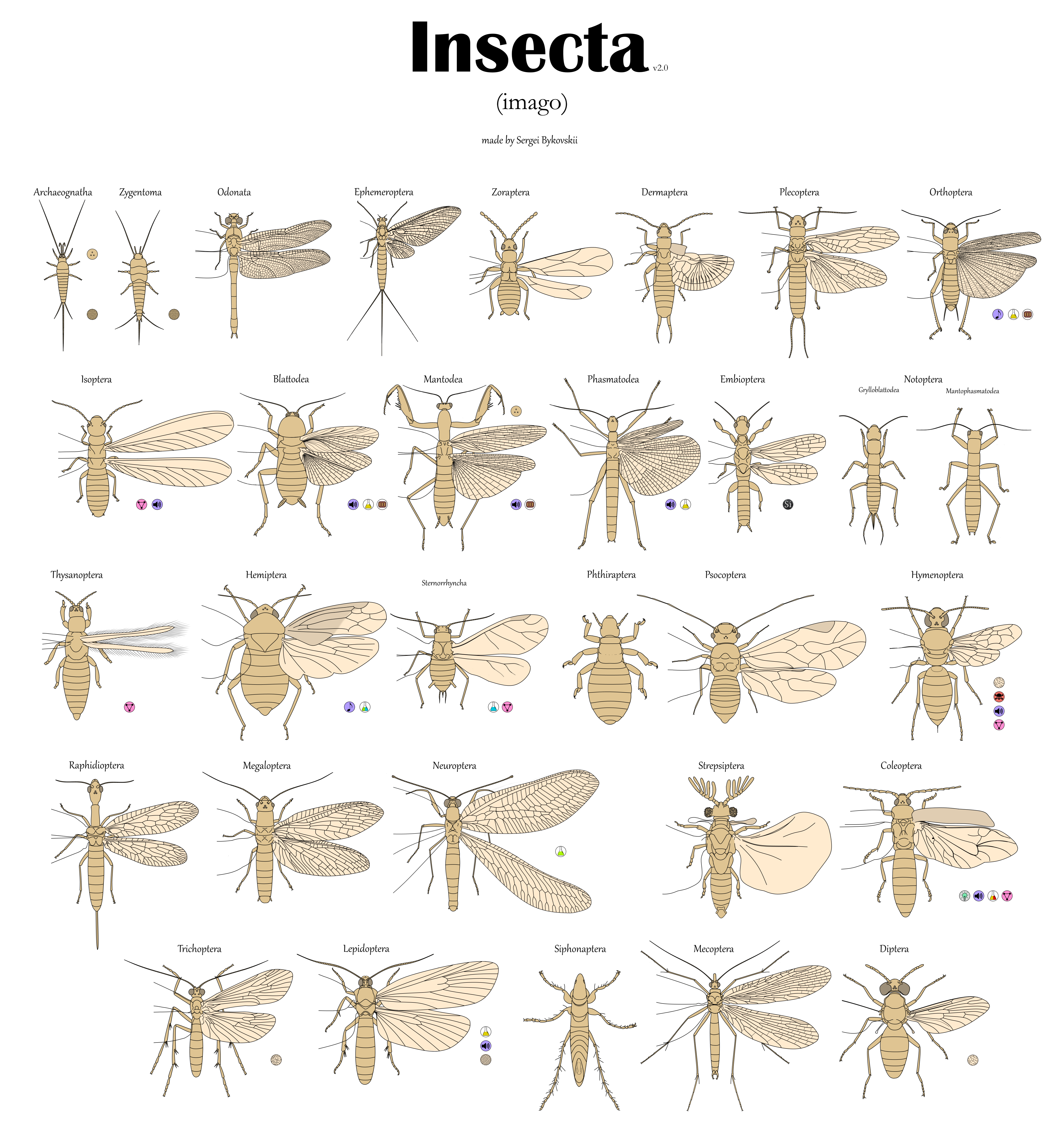 Сводная схема всех отрядов насекомых + я выделил небольшие группы, которые, на мой взгляд, могли бы побороться за статус отряда. Делал это для всех, по этому всё в свободном доступе. Надеюсь, пригодится всем, так как столкнулся с проблемой, что не существует сводной схемы, где изображались бы все отряды (нормально нарисованные). Постарался изобразить каждого максимально усреднённо, а не как на некоторых схемках - когда нарисован какой-то конкретный представитель отряда.